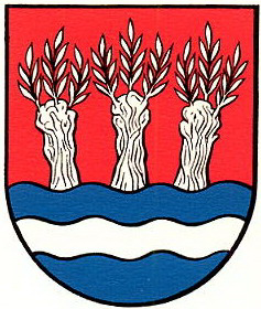 Blazon of Wittenbach, Canton of St. Gallen - Blazono de Wittenbach, Kantono de Sankt-Galo